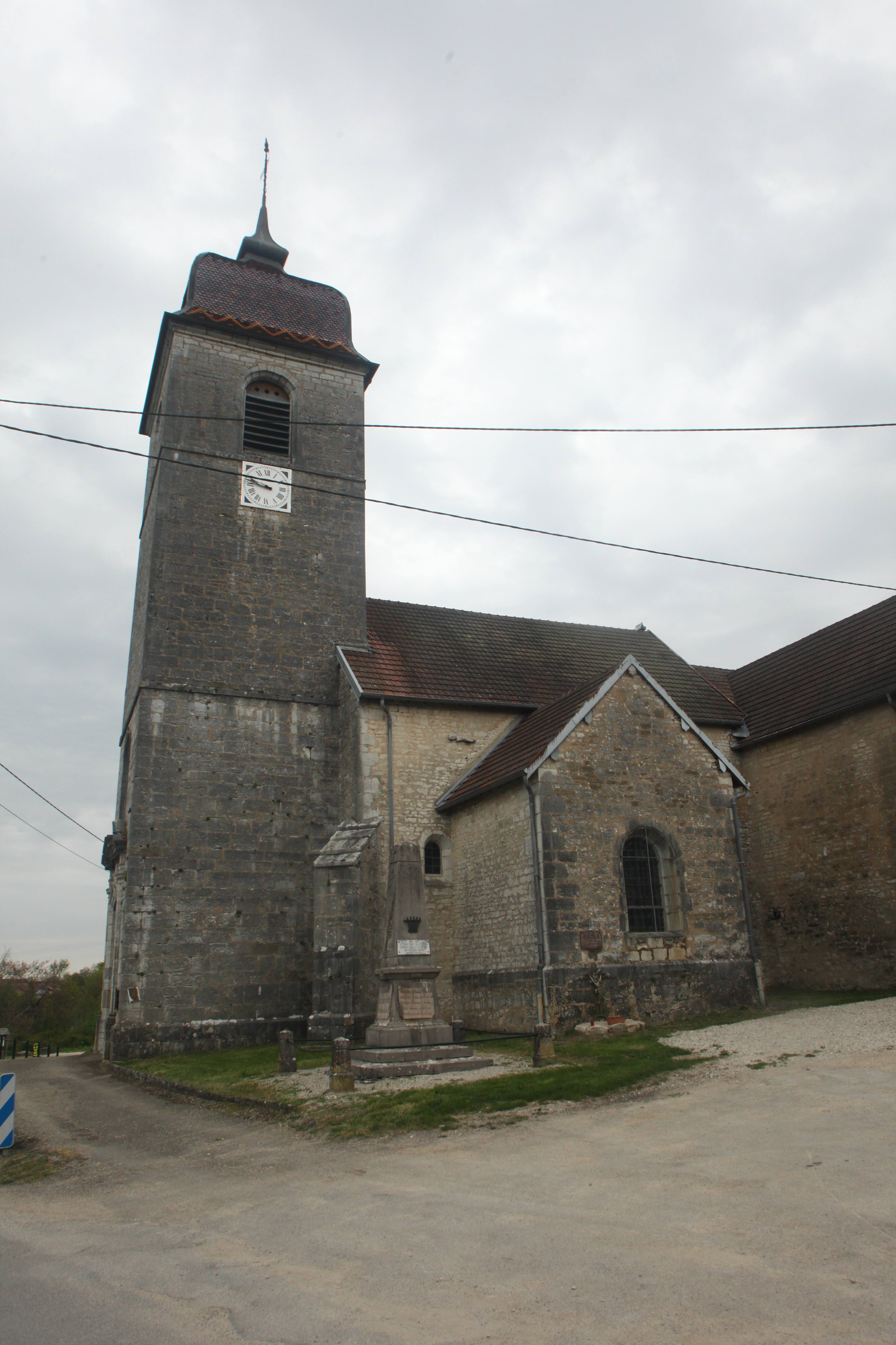 Église de Buffard (Doubs).